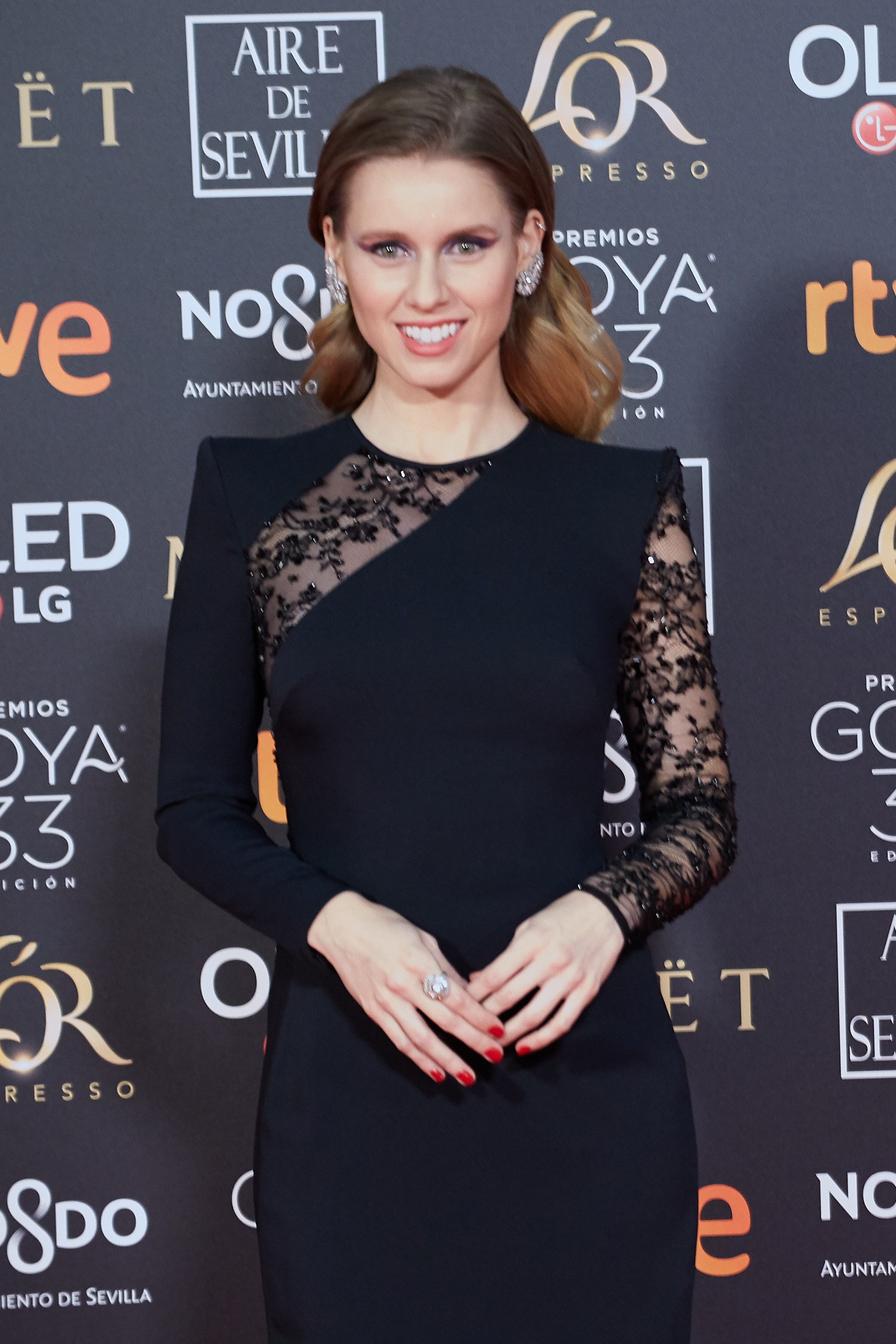 Manuela Vellés en la alfombra roja de los Premios Goya celebrados en Sevilla en Febrero 2019